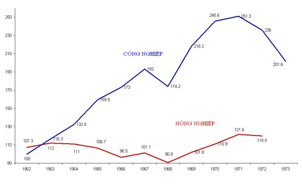 Chỉ số phát triển công nghiệp và nông nghiệp của Việt Nam Cộng hòa thời kỳ 1961-1973. Với công nghiệp, năm 1962=100; với nông nghiệp, năm 1961=100. Người truyền lên tự vẽ trên cơ sở số liệu từ Kinh tế Niên báo (Ngân hàng Quốc gia Việt Nam, Việt Nam Cộng hòa) năm 1974.